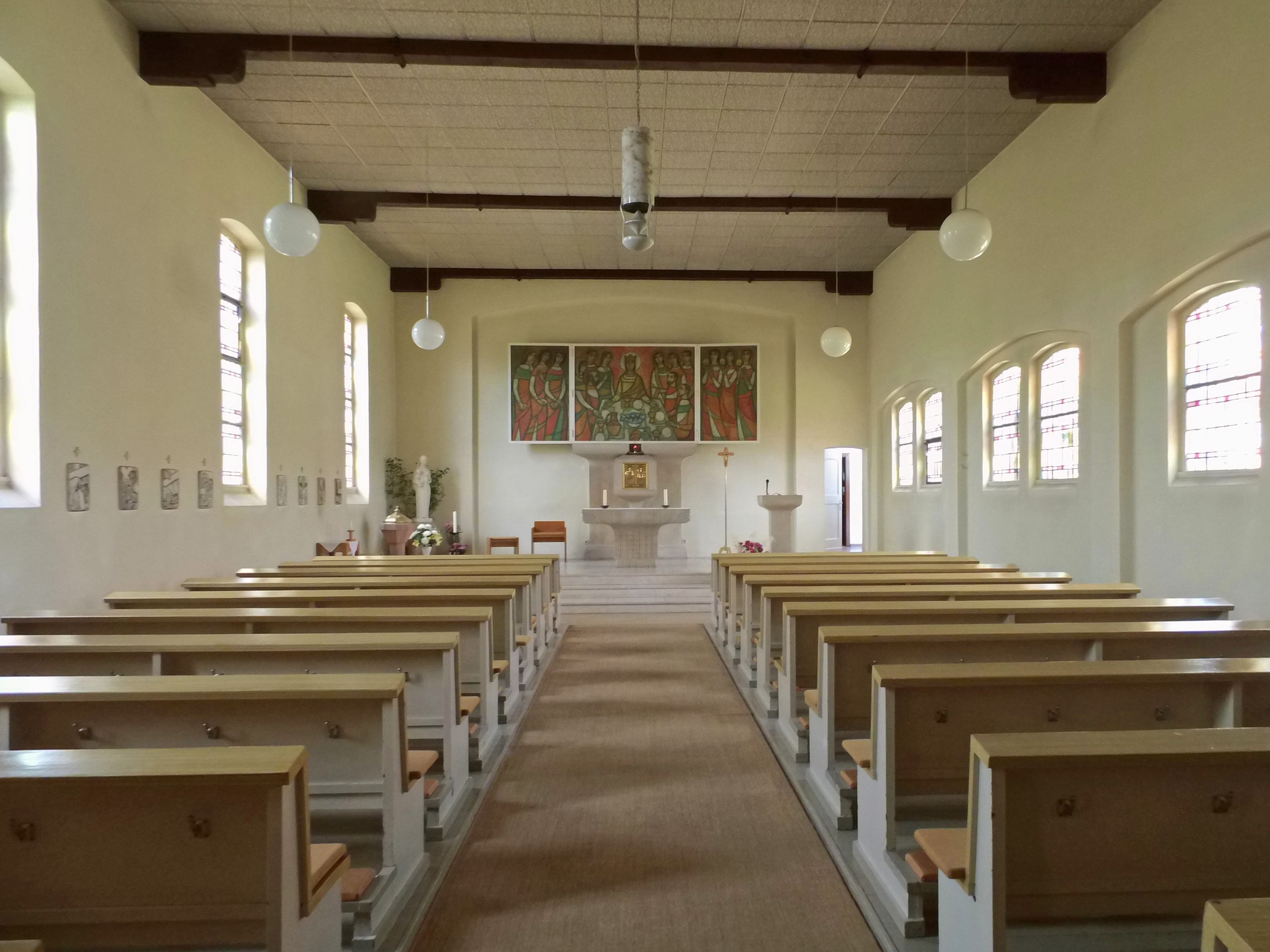 Katholische Kirche St. Josef in Wolmirstedt (Sachsen-Anhalt)